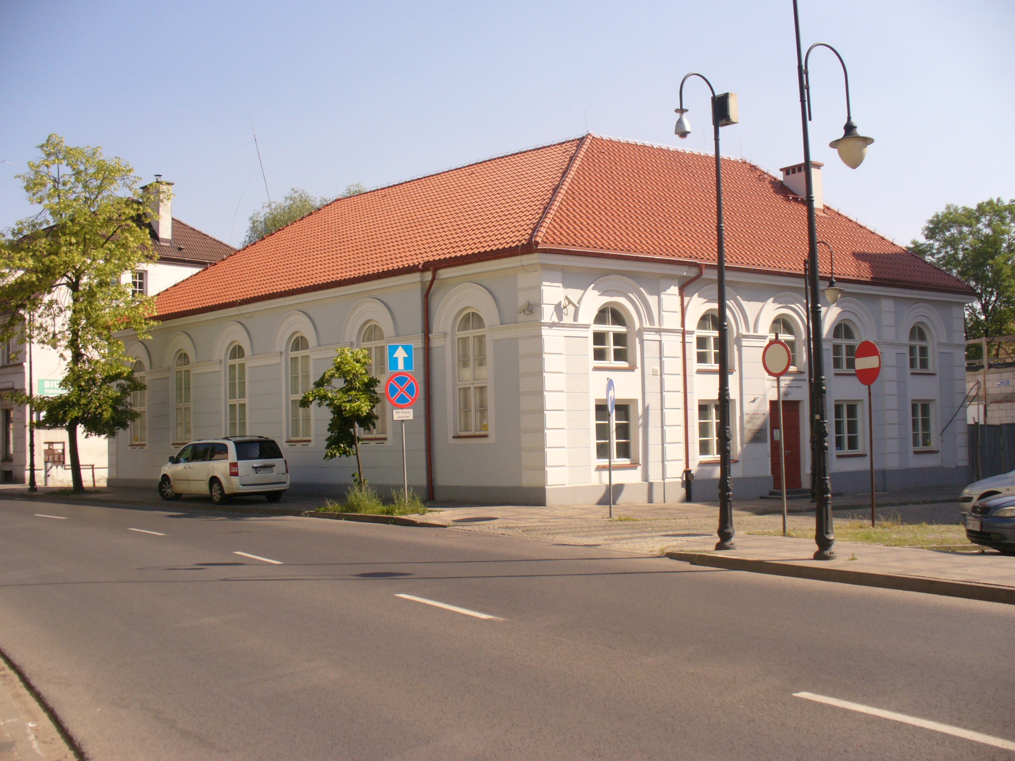 Płock, synagoga, ob. nieużytkowana, 1810